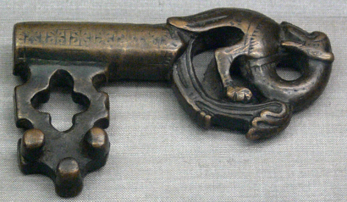 Schlüssel aus Kloster Memleben; 2. Hälfte 12. Jh. Kunstgewerbemuseum Berlin, Inv. Nr. 95,111